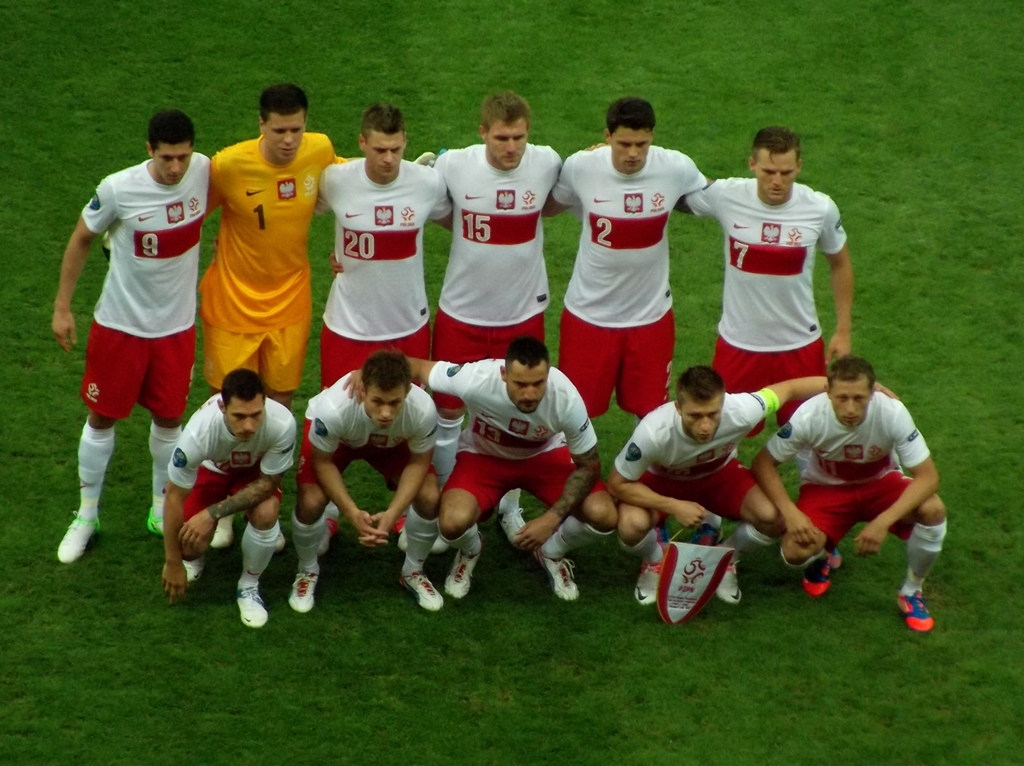 Zdjęcie zrobione w pierwszym dniu UEFA Euro 2012 w Warszawie, dniu otwarcia turnieju i meczu Polska-Grecja.